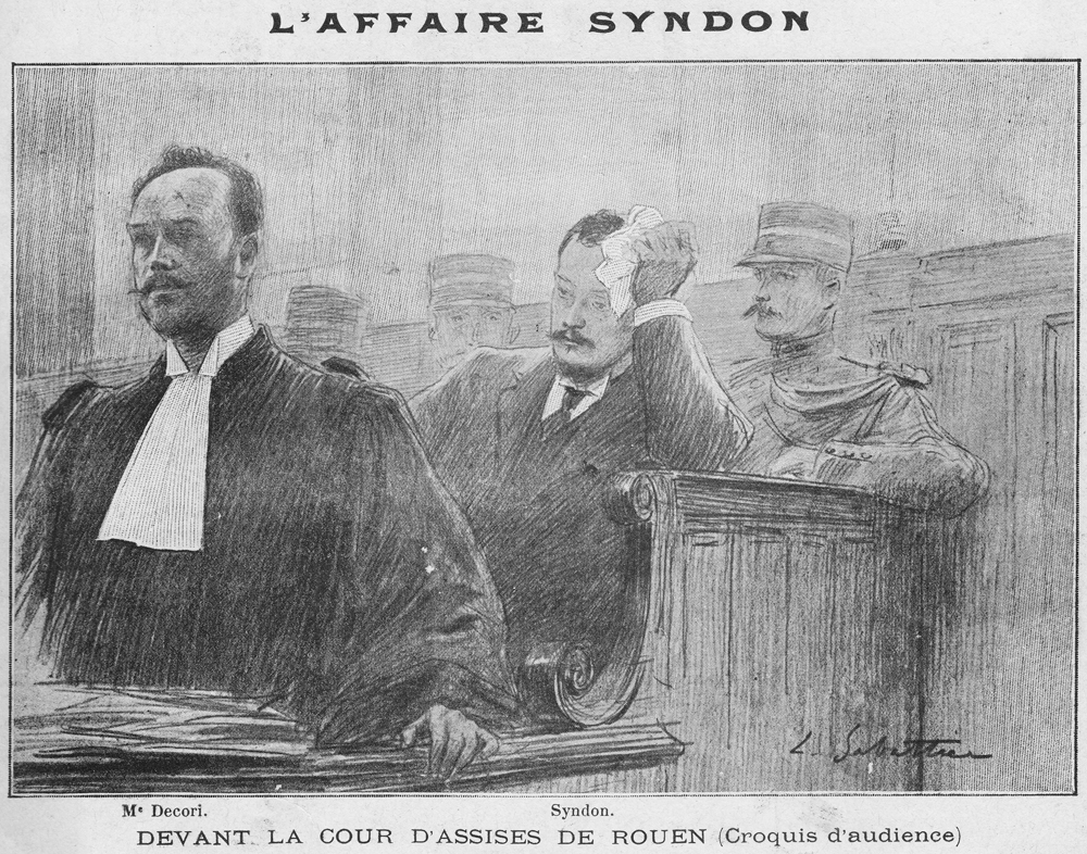 Procès de Jean Syndon devant la cour d'Assises de Rouen en 1902